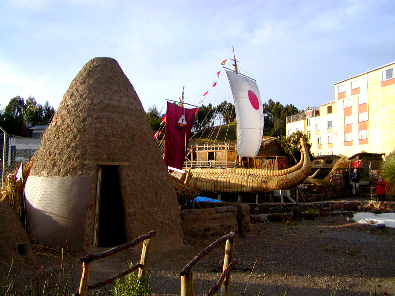 Bolivien – Museum in Huatajata am Titicacasee – Die Brüder Limachi, Erbauer der RA II von Thor Heyerdal bauen hier heute noch Schilfboote